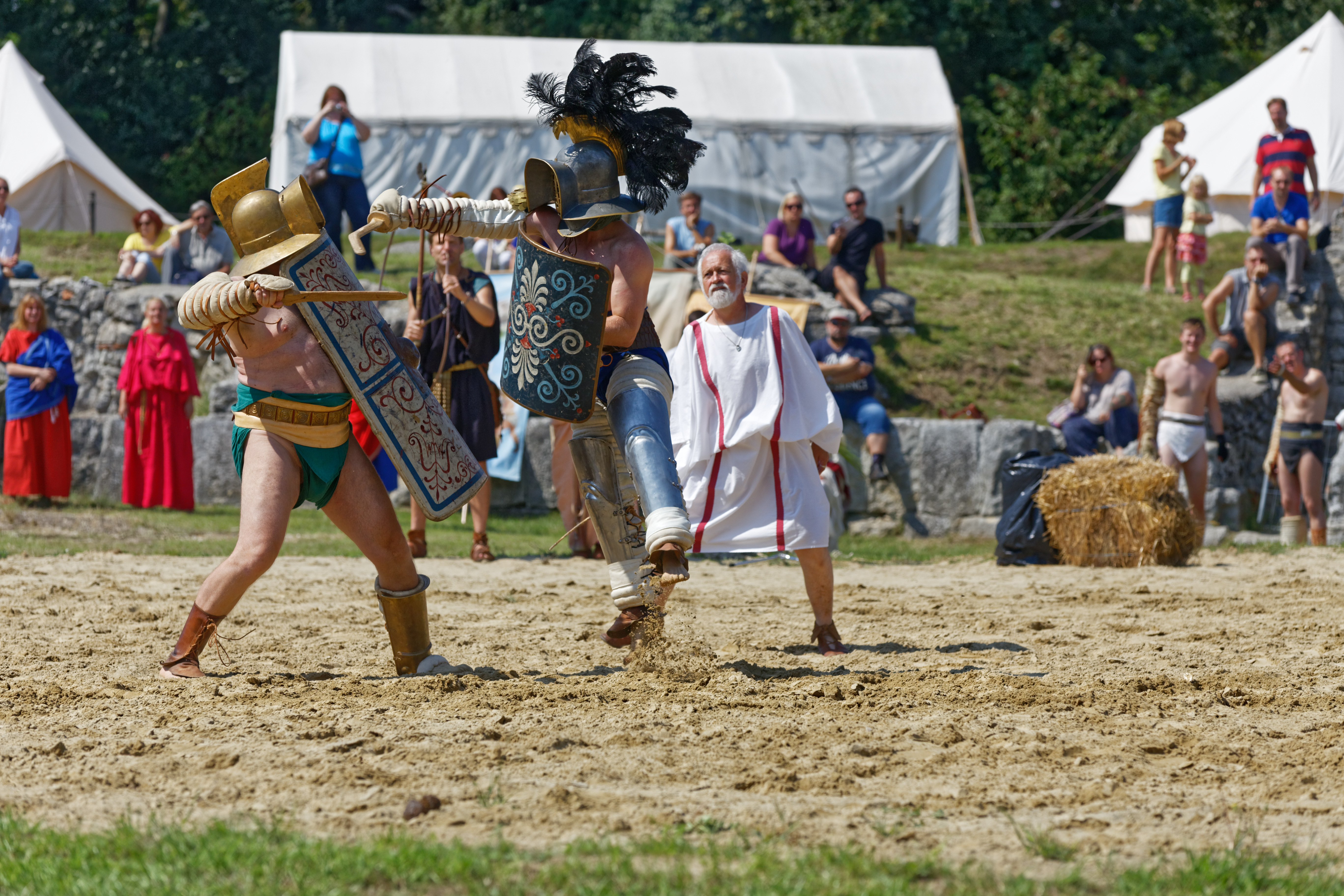 Thraex gegen Murmillo, Vorführung beim Gladiatorenfest in Carnuntum